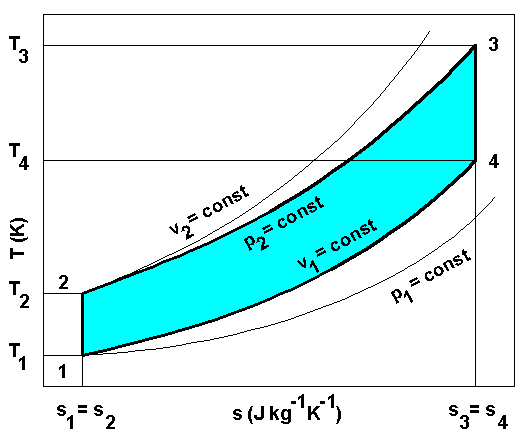 Diesel-ciklus T-s diagramban. AutoCAD és PhotoShop segítségével készült.